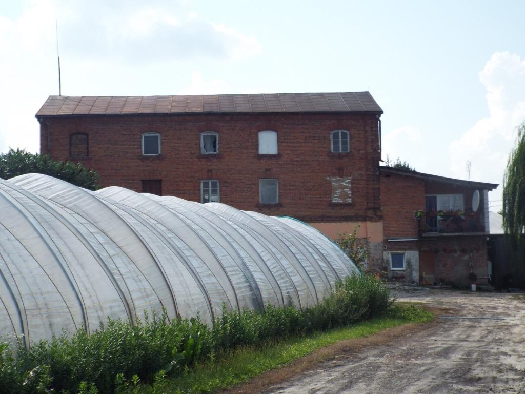 Grabowiec - młyn z pocz. XX wieku